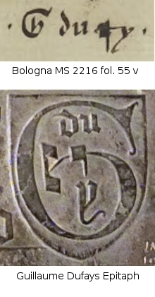 Notenrebus für G du fay; Exzerpt aus B 2216, fol. 55v und dem Epitaph Dufays